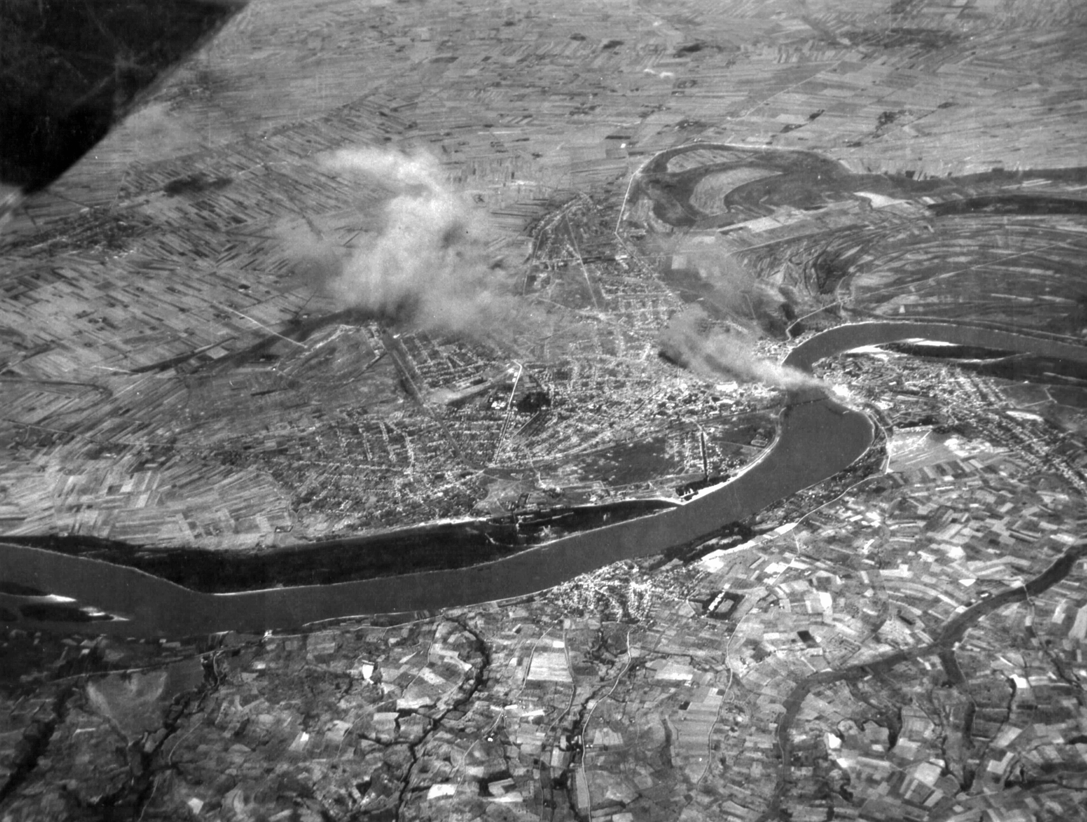 a város bombázása a II. világháború alatt. Location: Serbia, Novi Sad Tags: second World War, bombing Title: a város bombázása a II. világháború alatt.